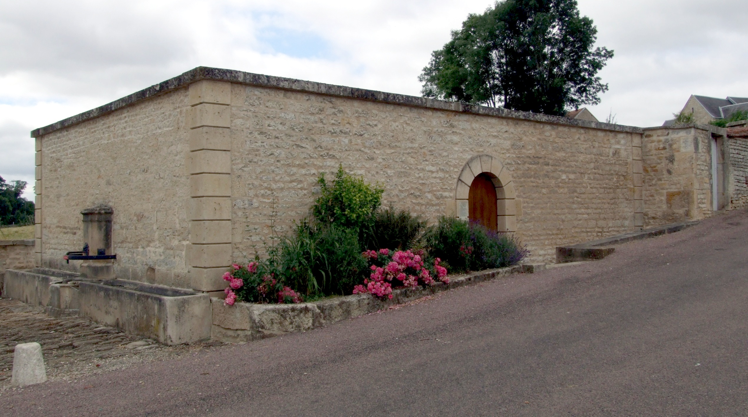 Lavoir de Baigneux-les-Juifs, Côte-d'Or, Bourgogne, FRANCE